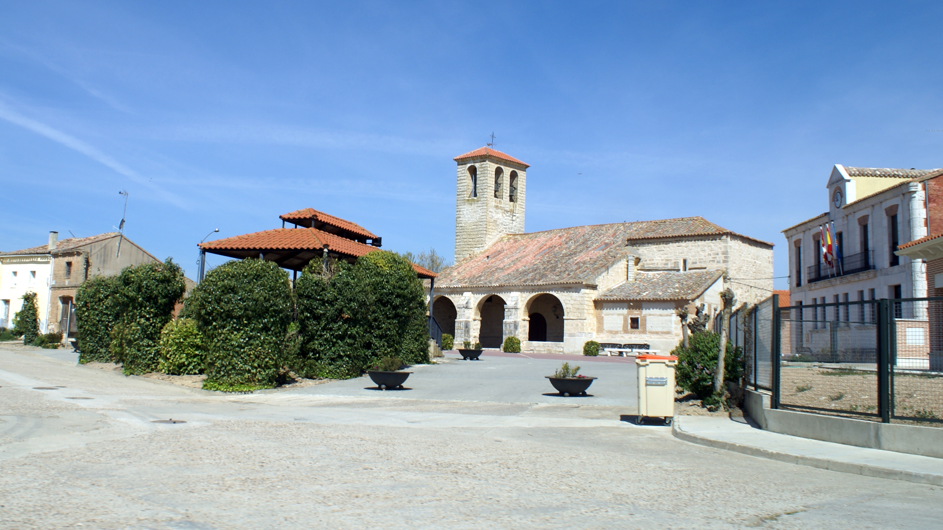 Marzales (Valladolid, España), vista de la iglesia de San Cristóbal y el ayuntamiento.